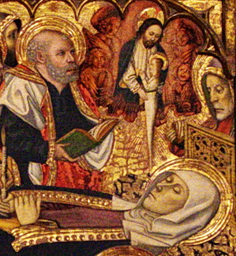 Capella Reial de Santa Àgata (Barcelona). Retaule del Conestable, obra de Jaume Huguet (1464-1465). Detall de la taula de "la mort de Maria". Tremp sobre taula (673 x 368 cm)